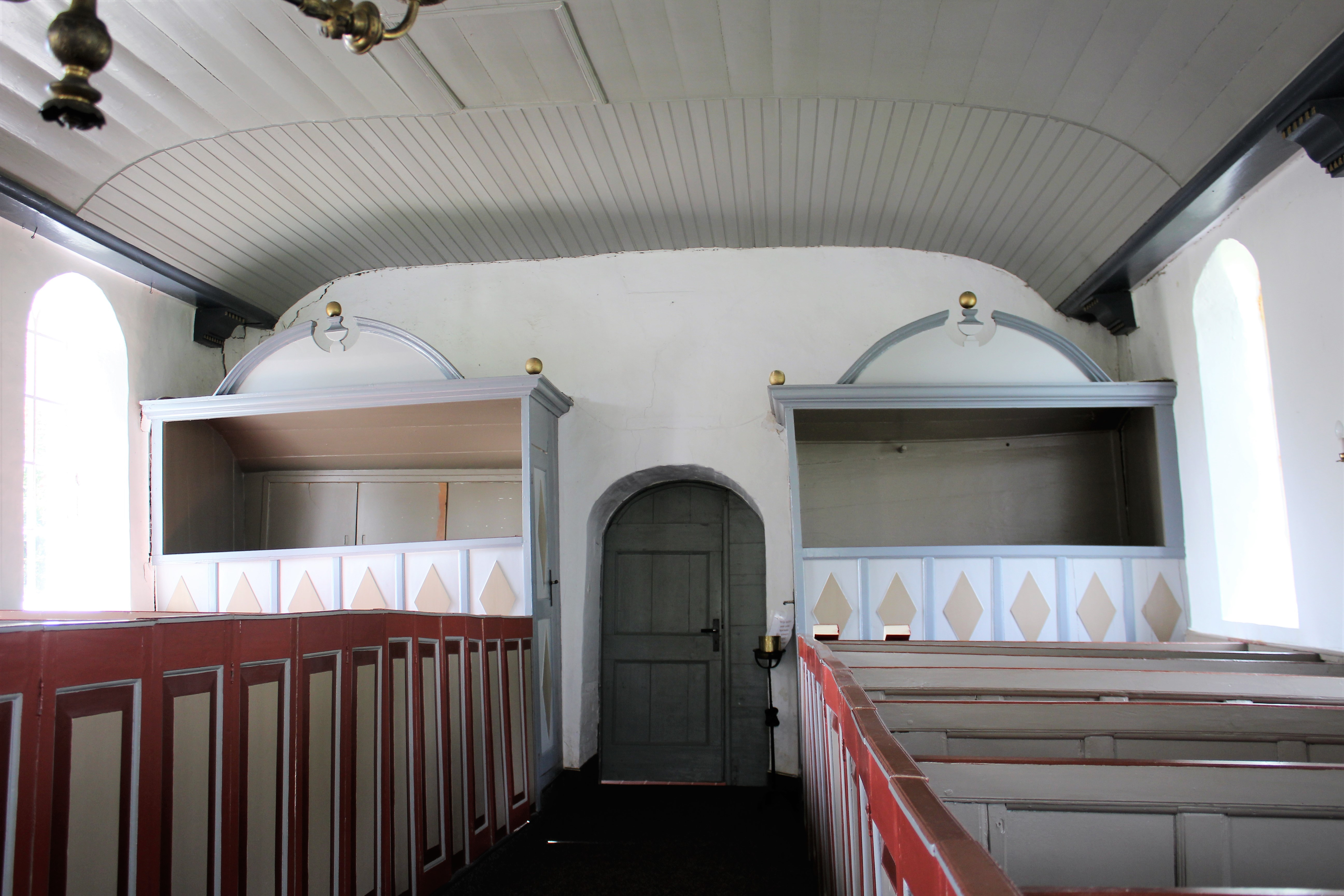 Ev.-reformierte Kirche St. Maria in Marienchor, Gemeinde Jemgum, Landkreis Leer, Ostfriesland, Deutschland